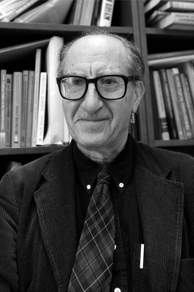 Foto Vicenç Navarro